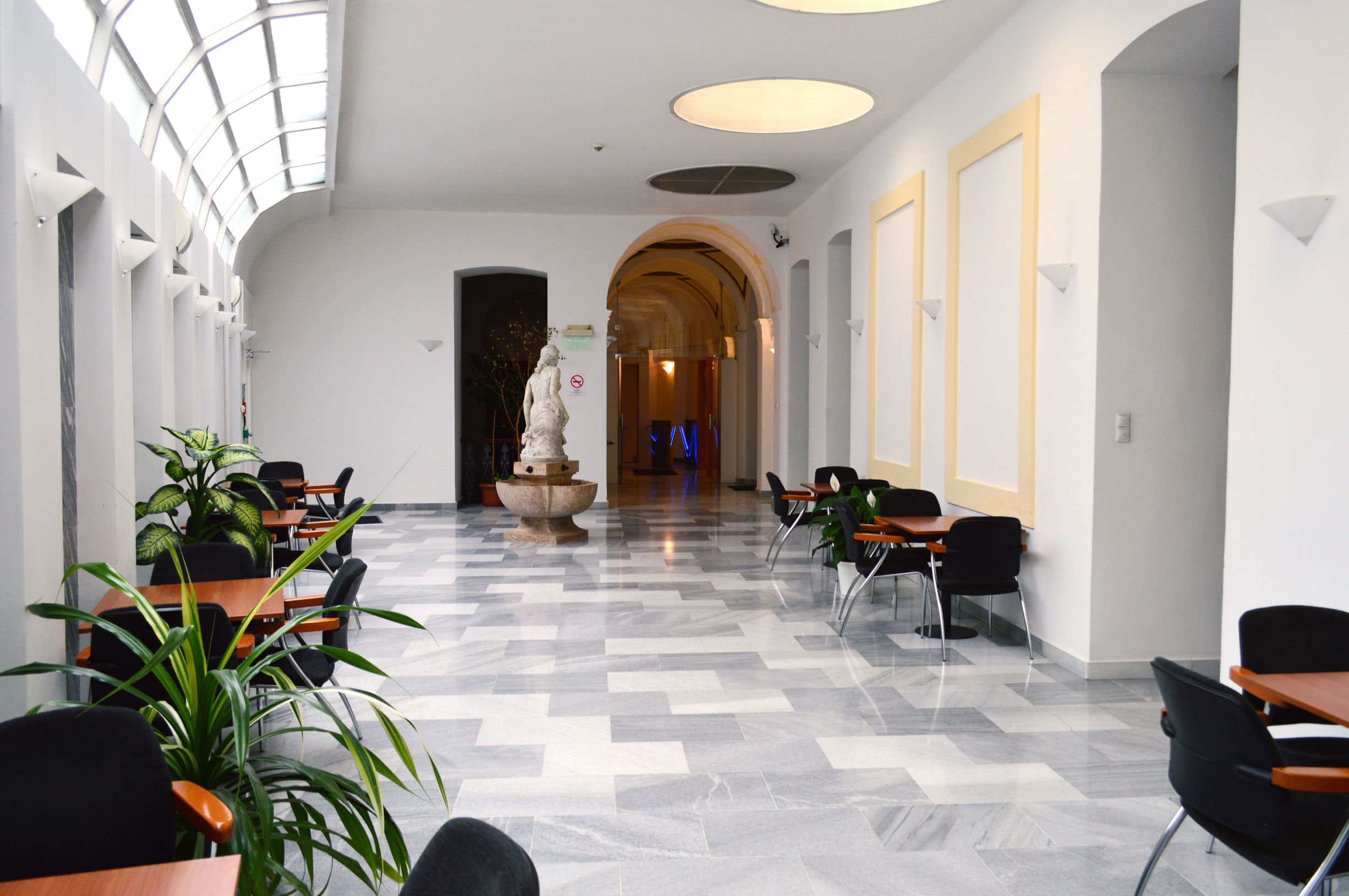 EMET székhely belső aula